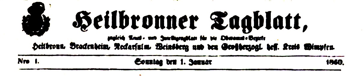 Titelkopf des Heilbronner Tagblatts